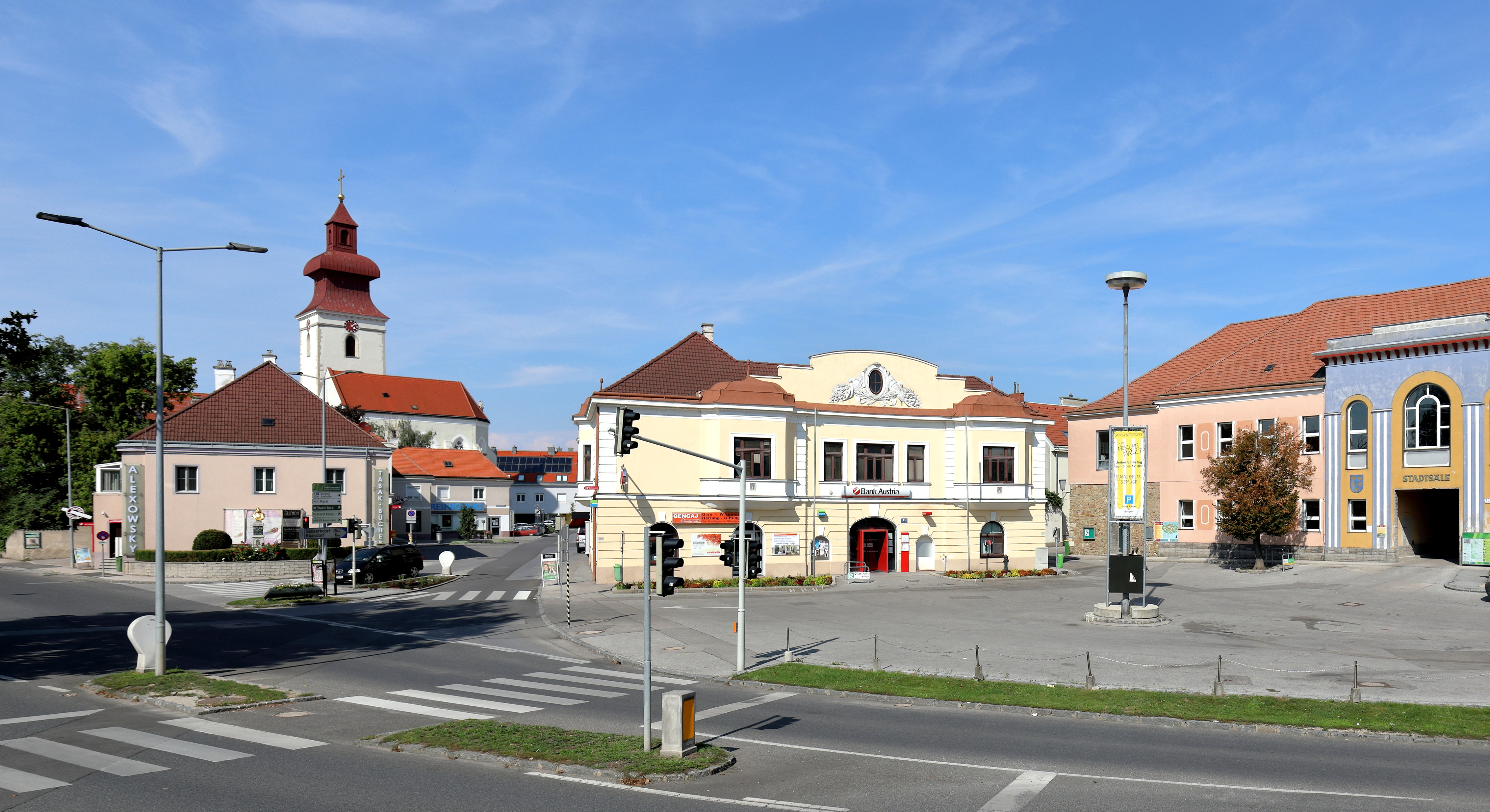 Der Hauptplatz der niederösterreichischen Stadtgemeinde Groß-Enzersdorf und links im Hintergrund die röm.-kath. Pfarrkirche Maria Schutz.